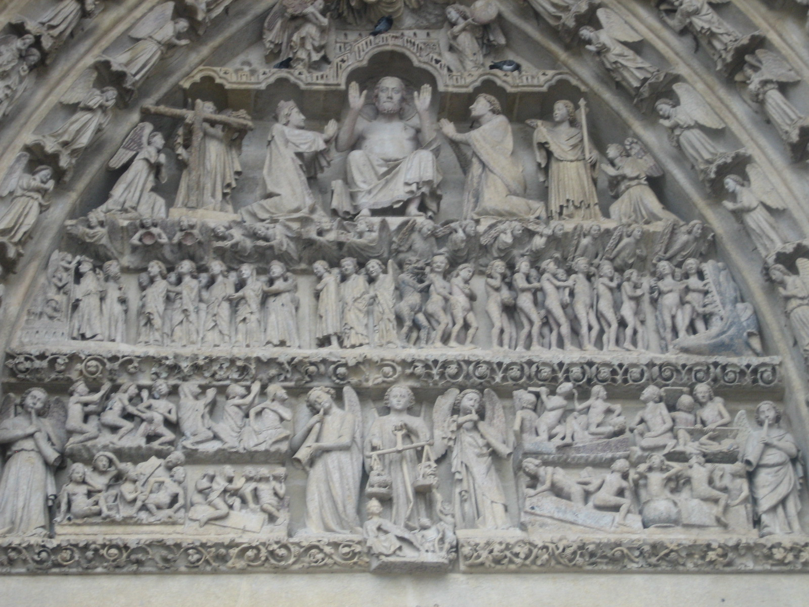 Mëttelsen Tympan vun der Haaptentrée (Westsäit) vun der Kathedral vun Amiens; duergestalt ass dat Jéngst Geriicht. 2006-04-30.